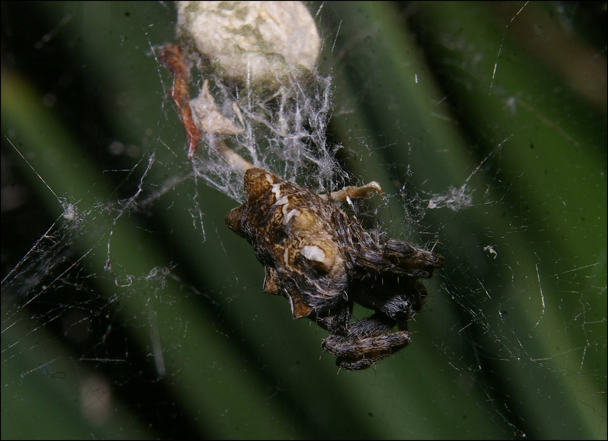 Cyrtophora femelle sous un cocon, près de Béziers 34. Observation Francis Marcou.